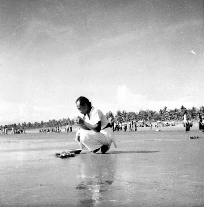 Repronegatief. Een priester biedt de zeegod Baruna een offer aan tijdens het reinigingsfeest "Melis" op Bali.